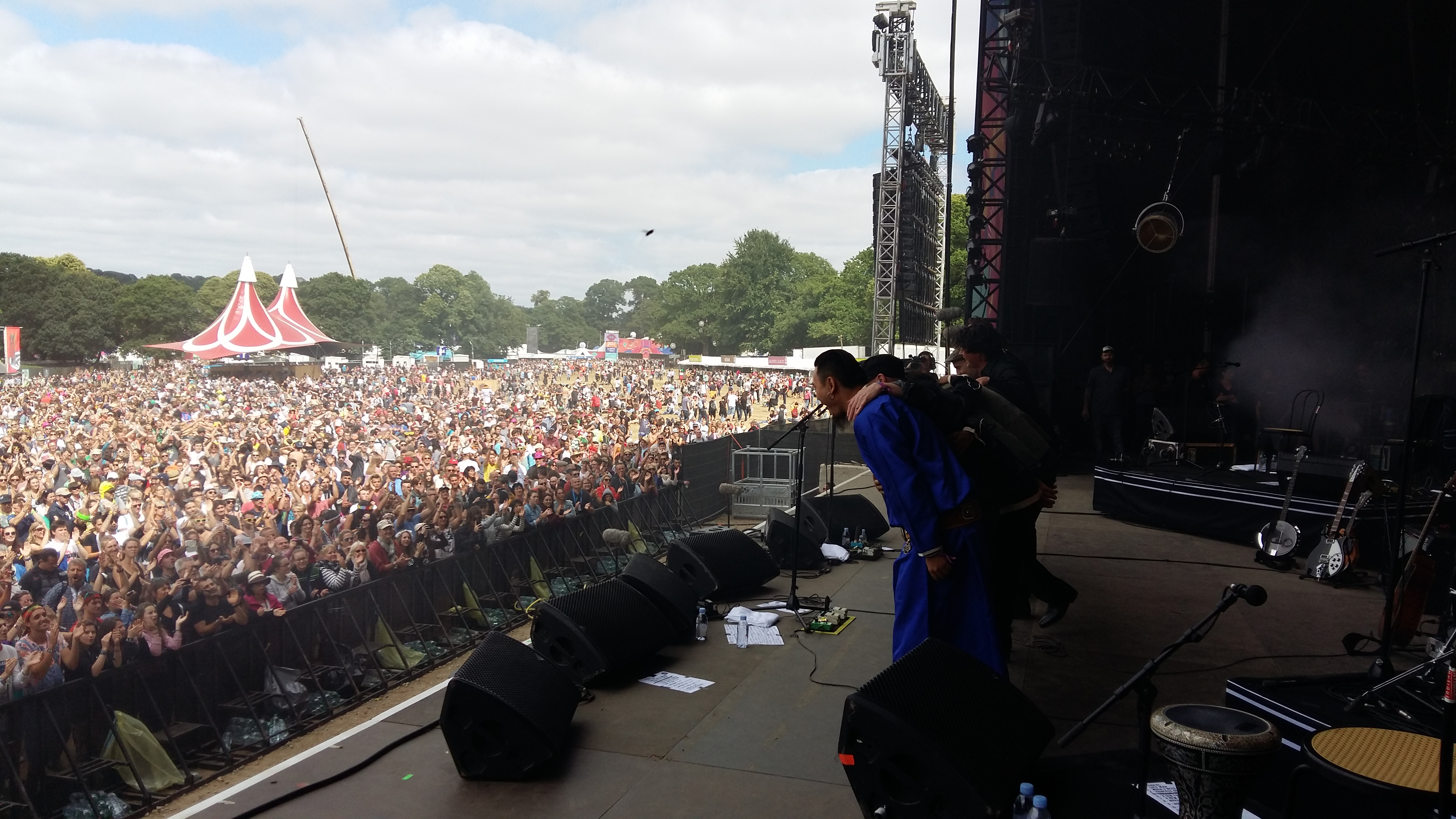 festival des Vieilles Charrues 2017